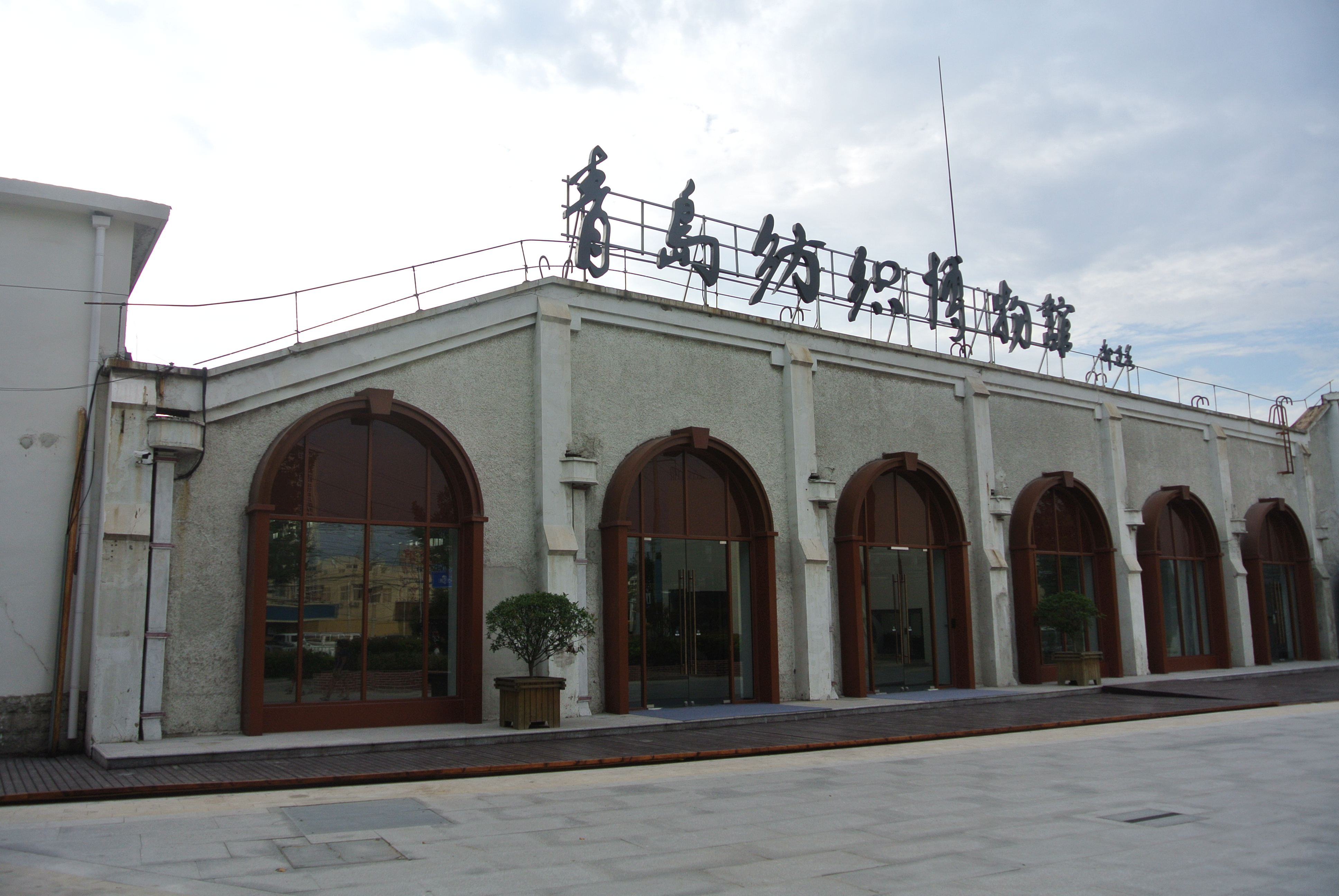 青岛纺织博物馆